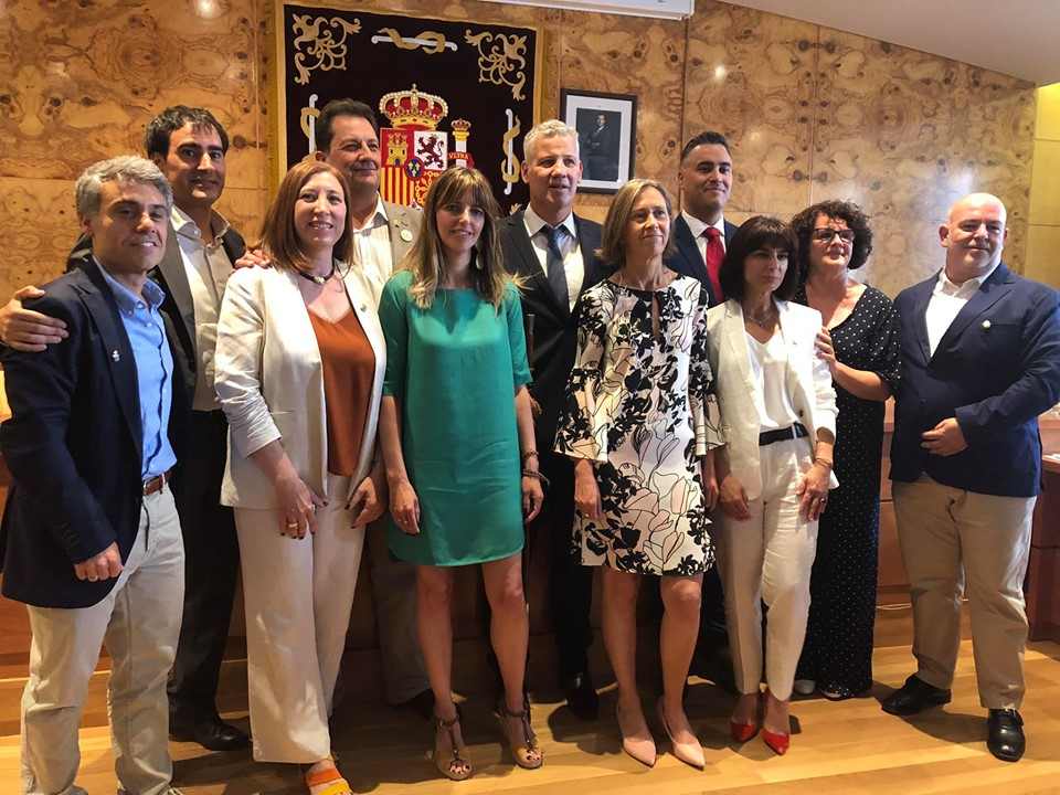 Torrelodones. Alfredo García-Plata junto a concejales de VxT el día de su elección como Alcalde de Torrelodones (15-06-2019)